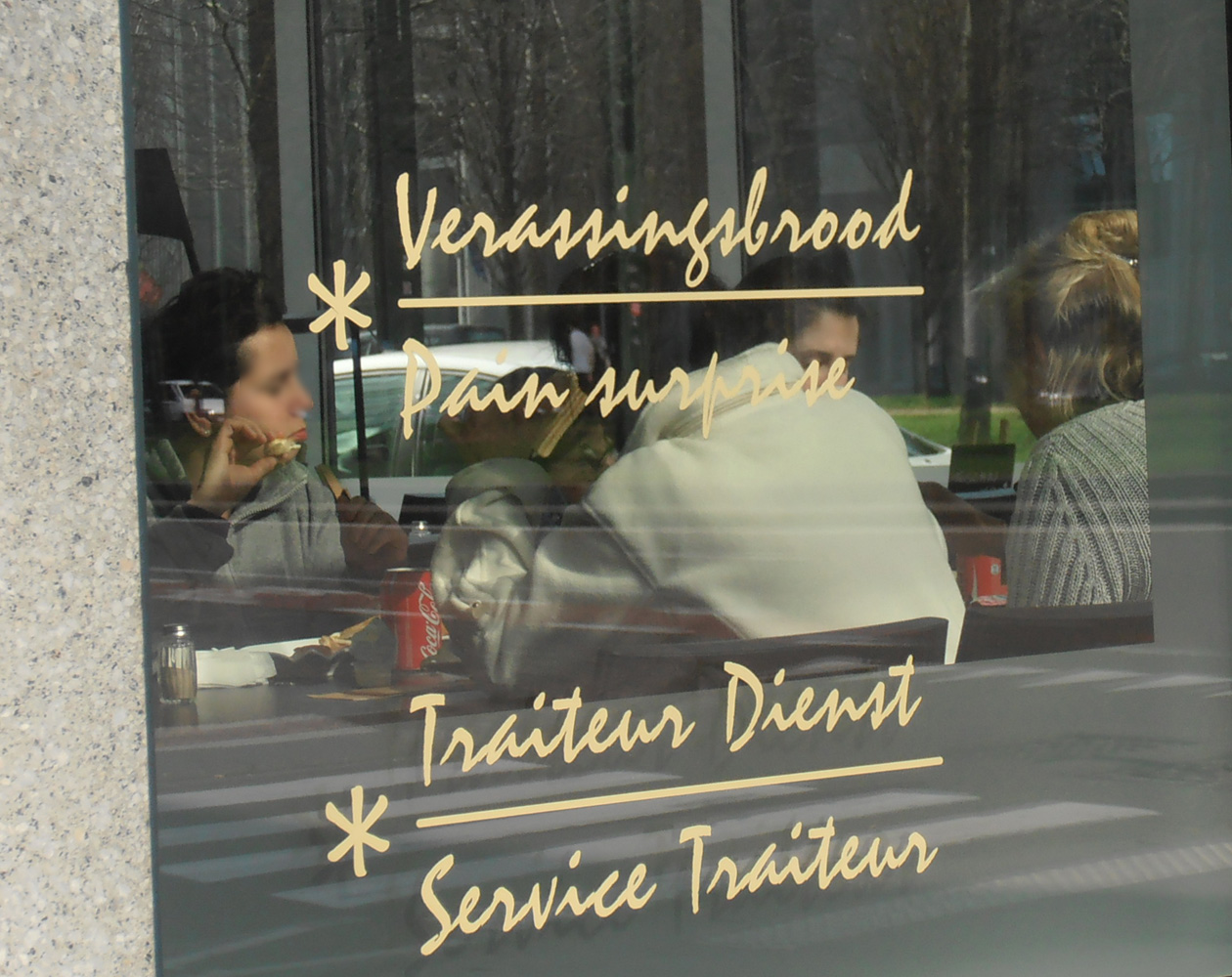 Een spelfout + onjuist spatiegebruik (gezien in Brussel)